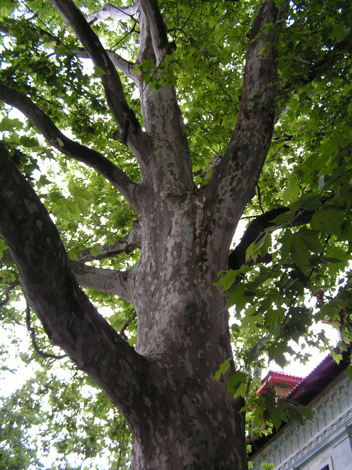 Un platane à Lucenec en Slovaquie